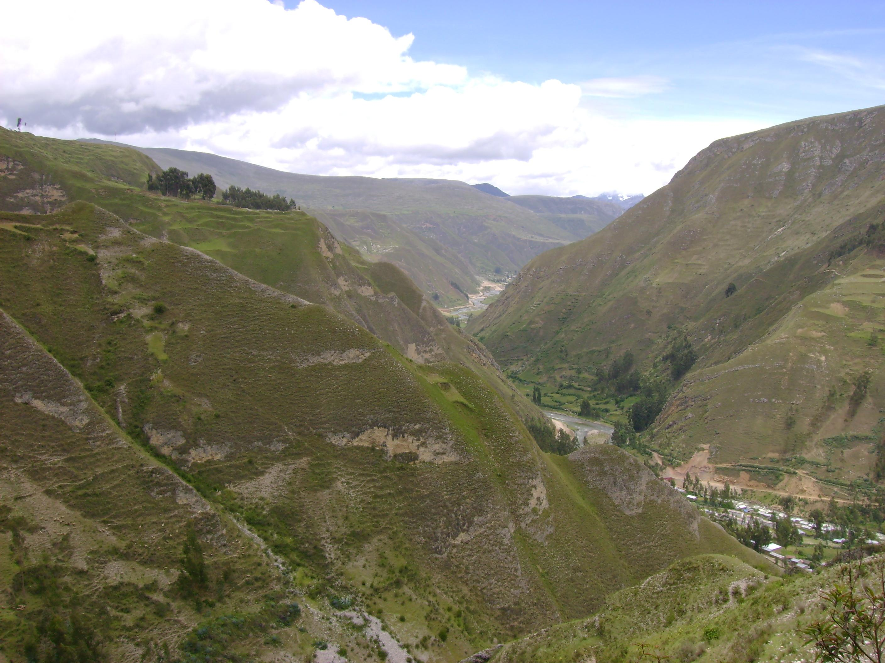 Cañon del río Vizcarra.